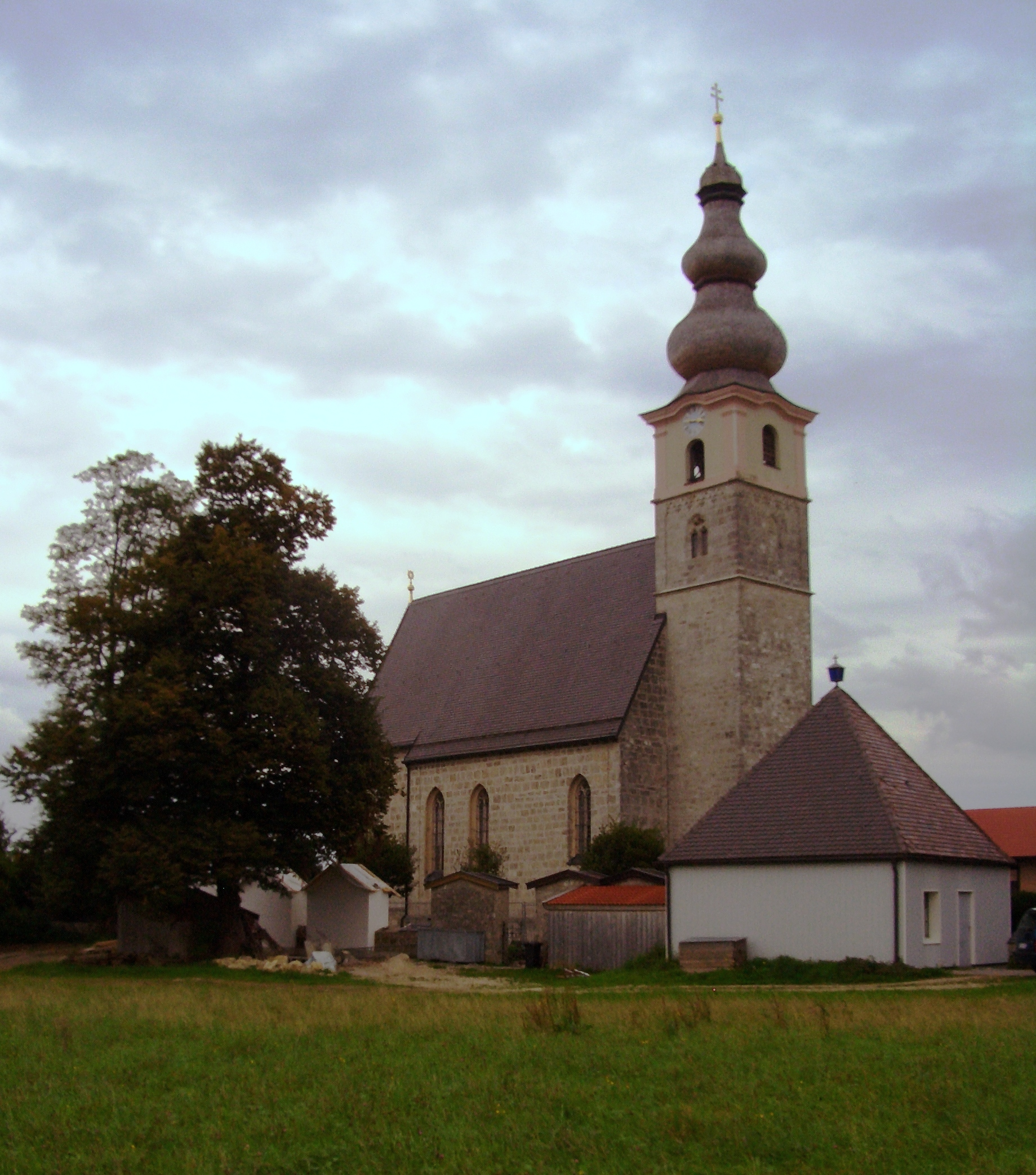 Dorfkirche St. Martin im Ortsteil Pietling von Fridolfing